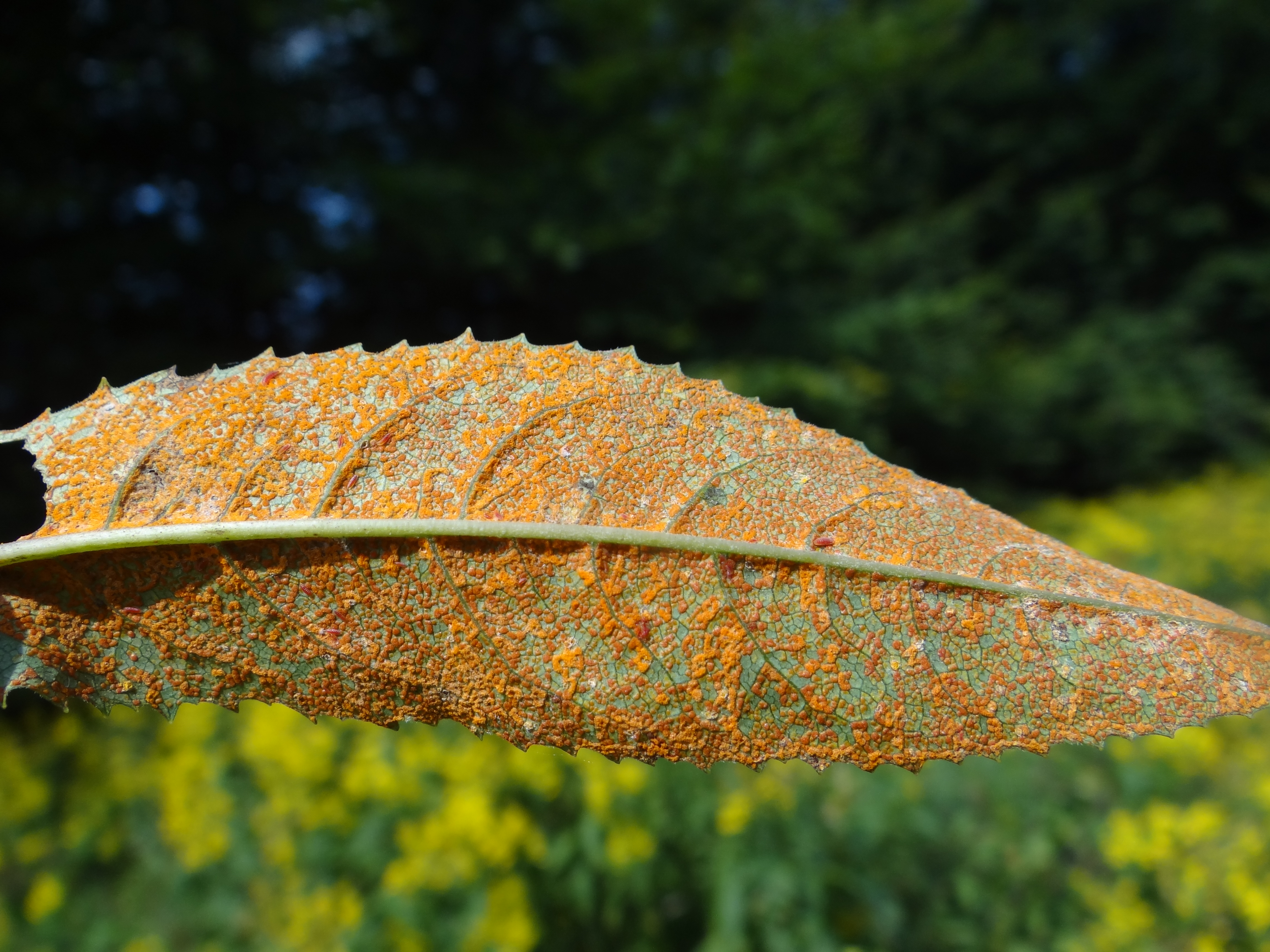 Puccinia glomerata on Senecio sylvestris